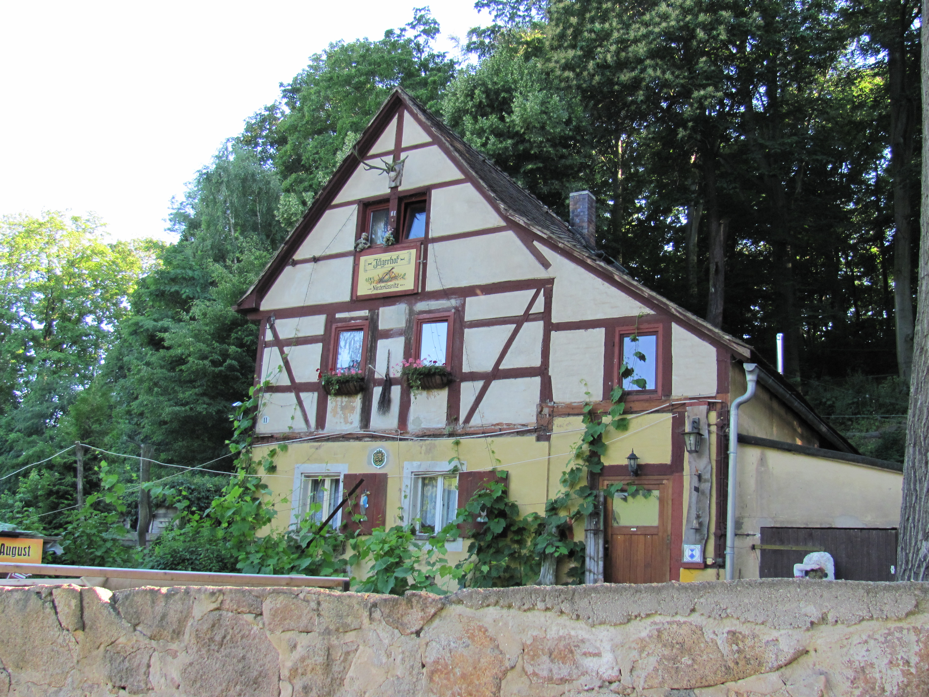 Auf den Bergen